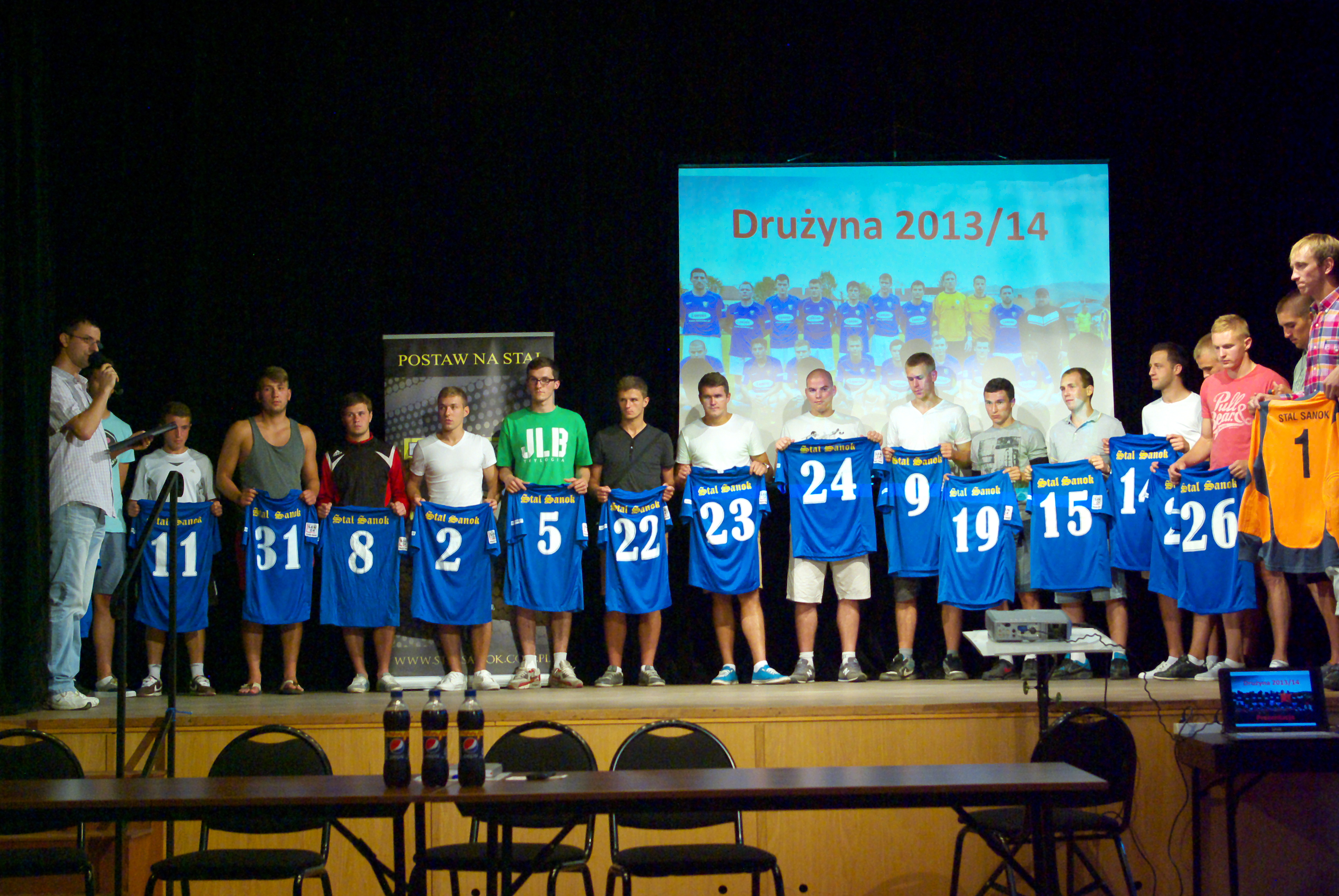 Konferencja z okazji powołania spółki Stal Sanok 24 lipca 2013. Prezentacja drużyny Stali Sanok przed sezonem 2013/2014